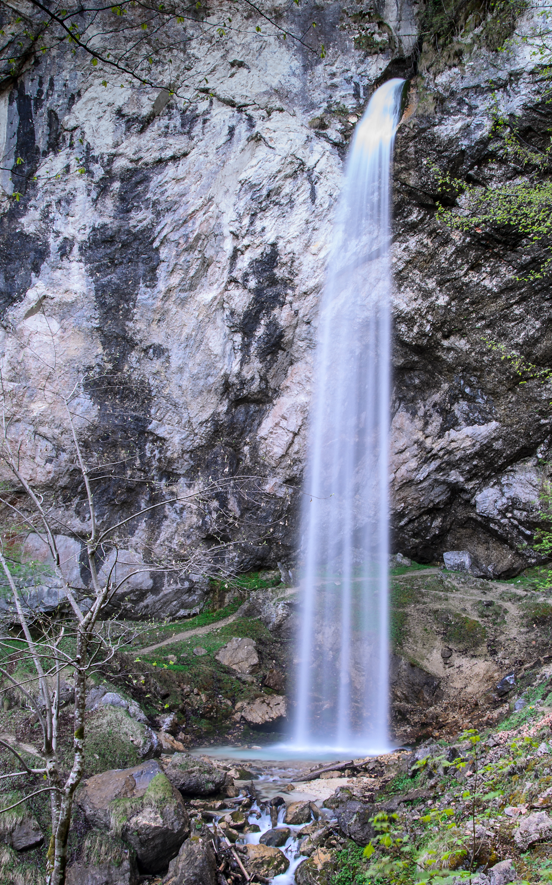 Wildensteiner Wasserfall This media shows the natural monument in Carinthia with the ID Vö 31.